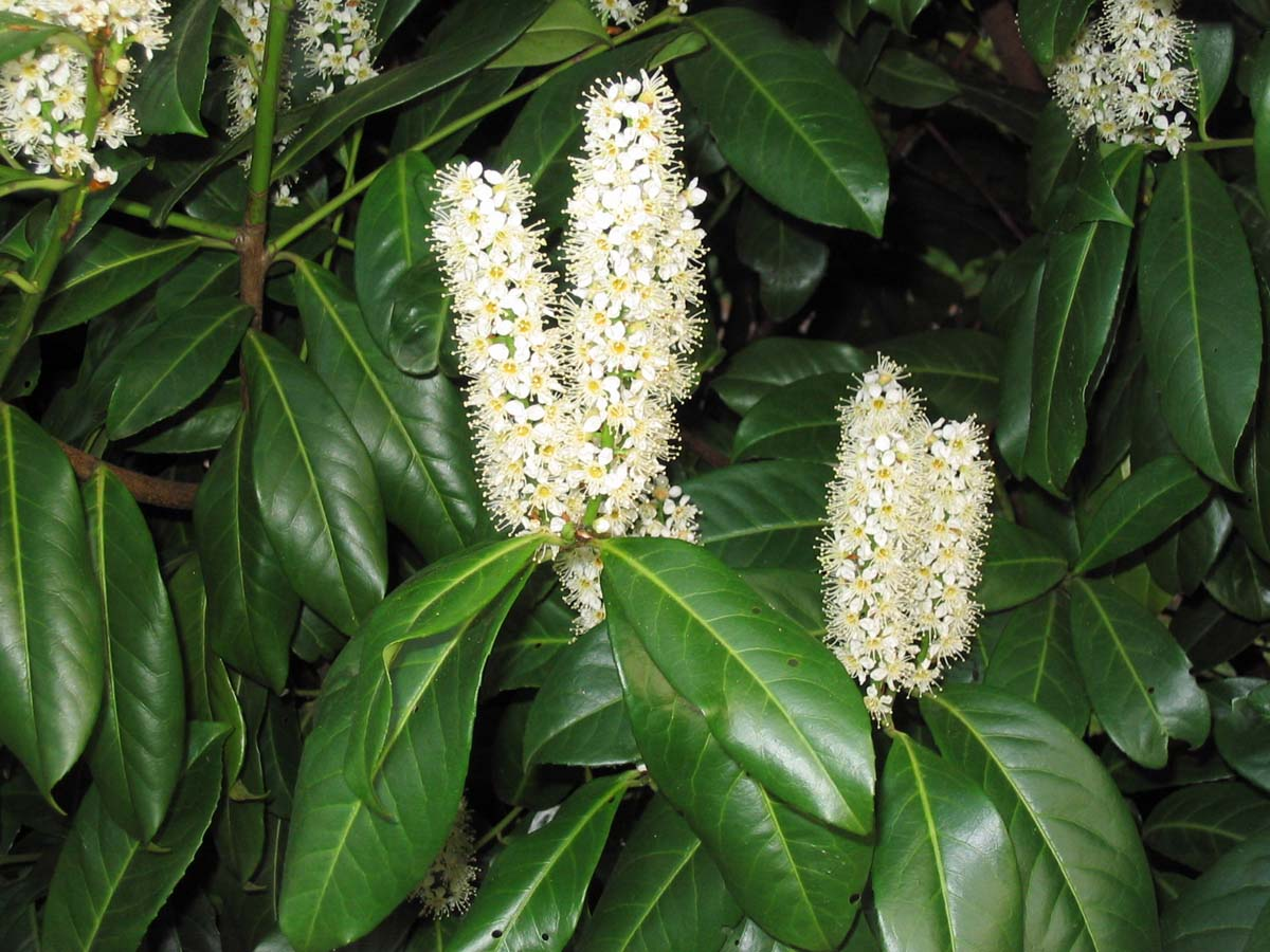 Laurierkers in bloei. Zelfgemaakte foto.